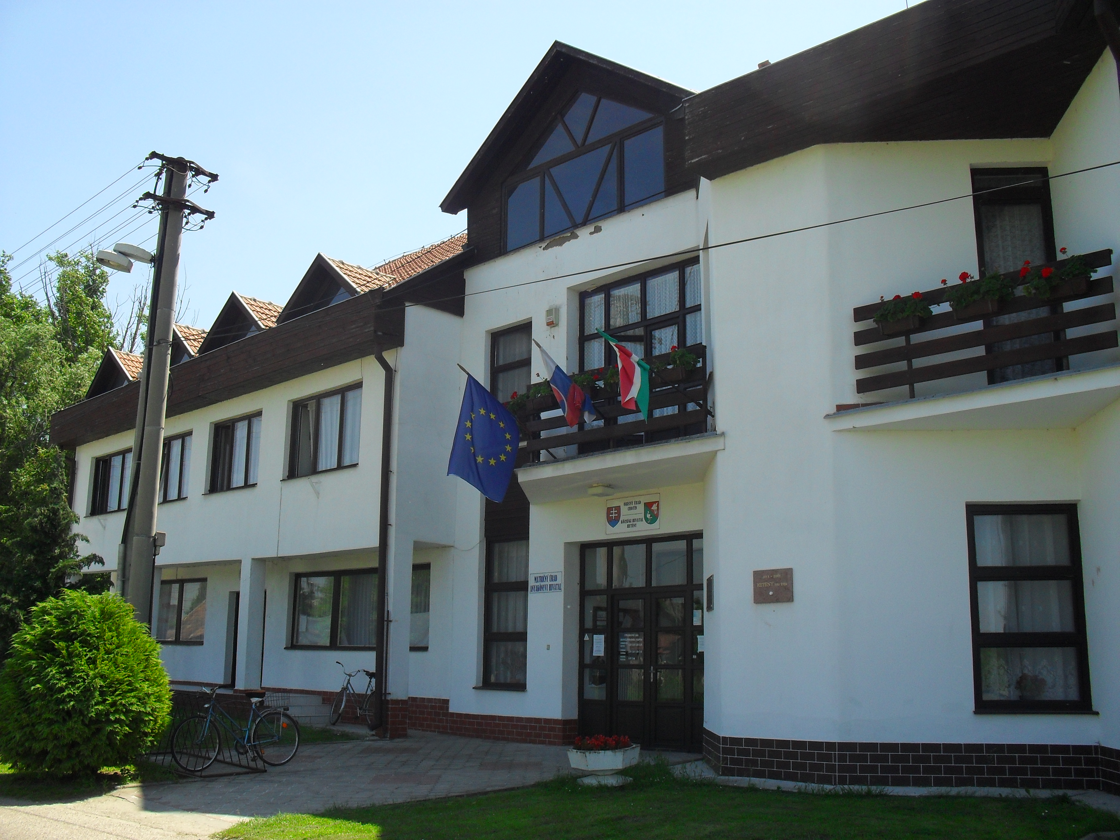 Hetény - községi hivatal